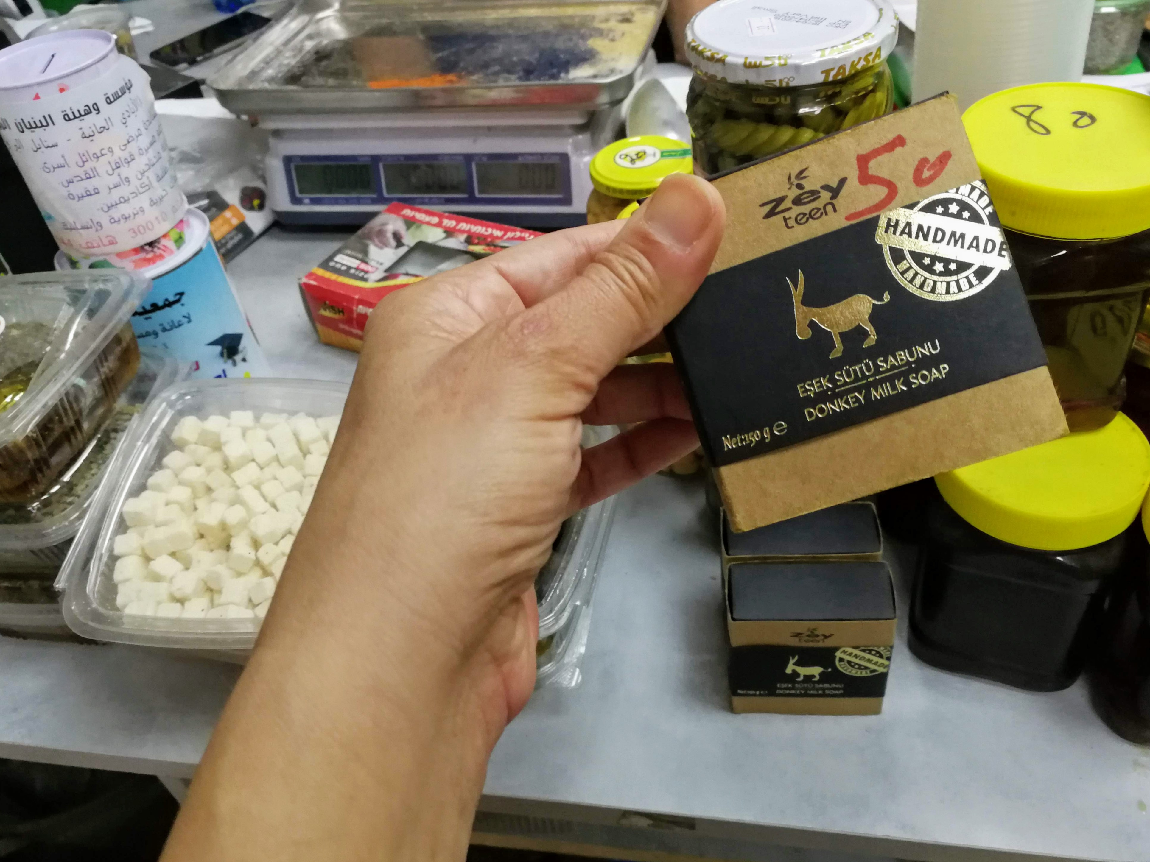 סבון העשוי מחלב-חמורים